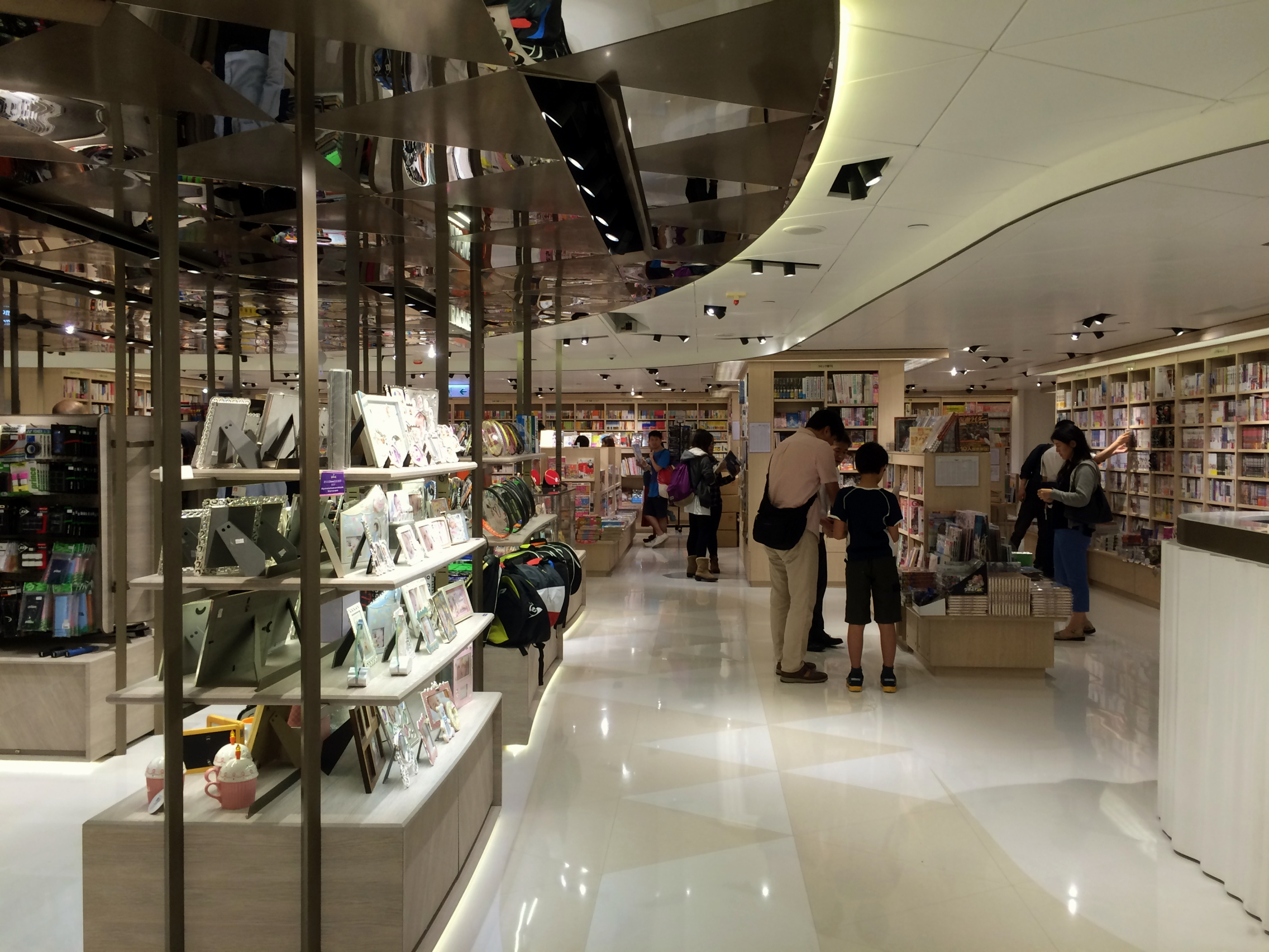 SOGO Club Level 11